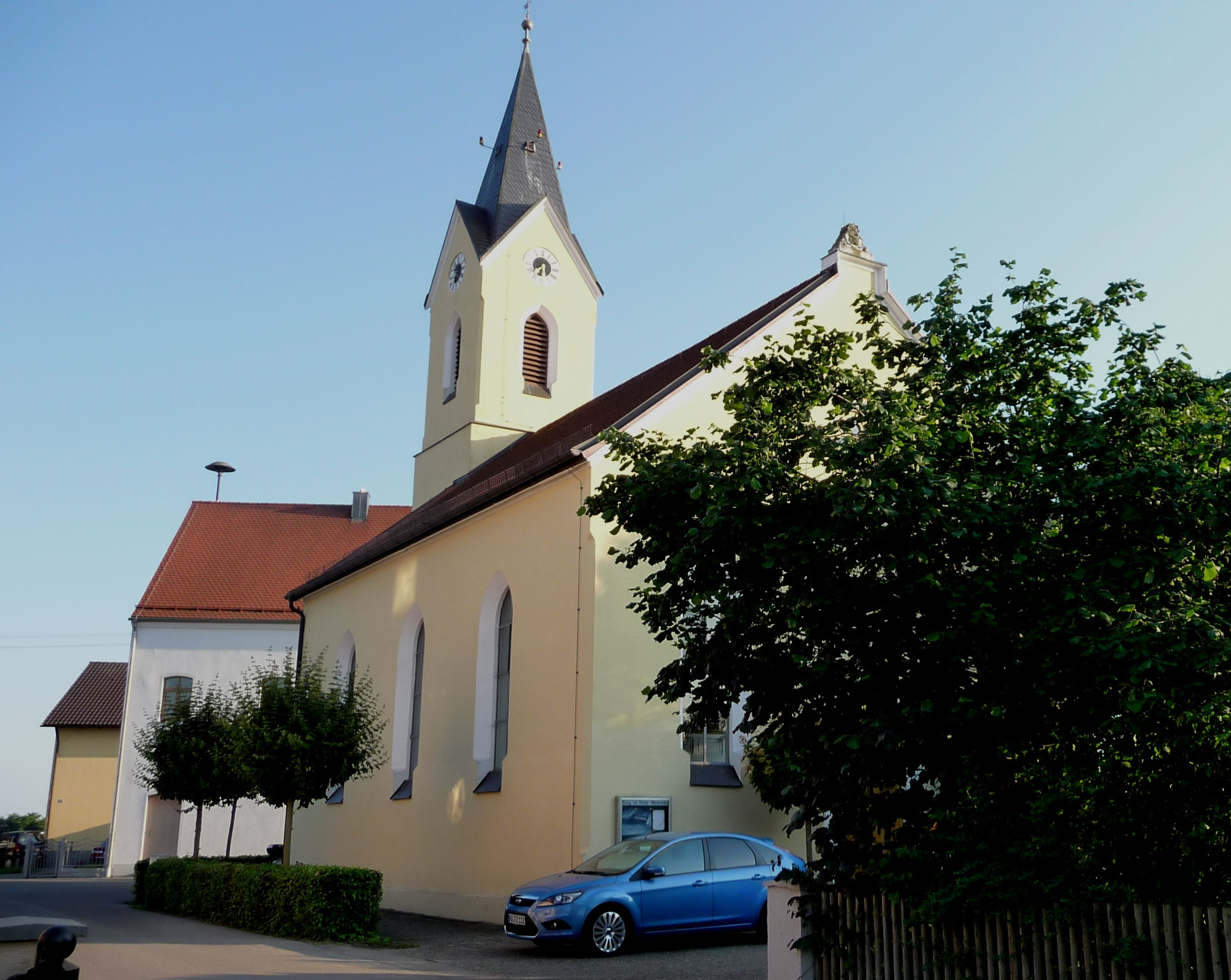 Die Kirche der Ev. Ref. Gemeine Marienheim.